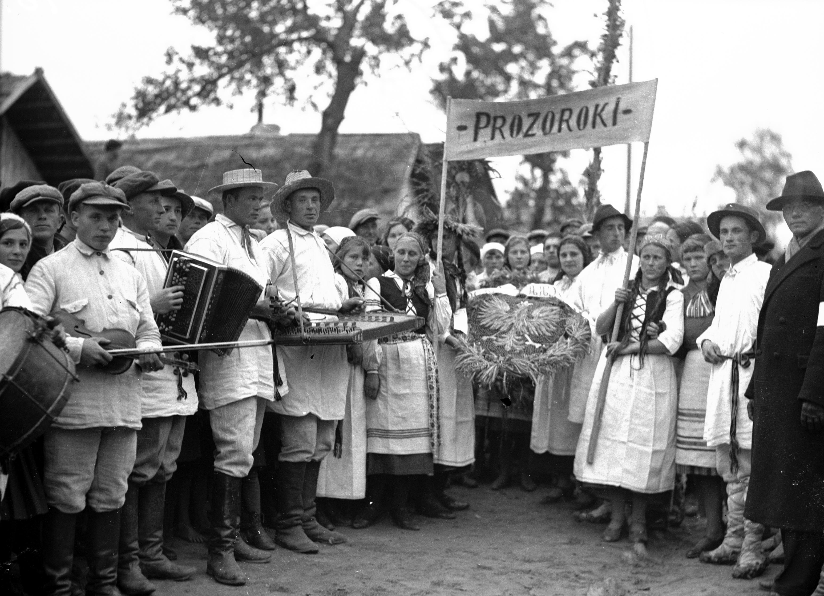 Беларуская (тарашкевіца): Глыбокае (Hłybokaje), сьвяткаваньне Дажынак (Dažynki). Дэлегацыя зь мястэчка Празарокаў (Prazaroki)